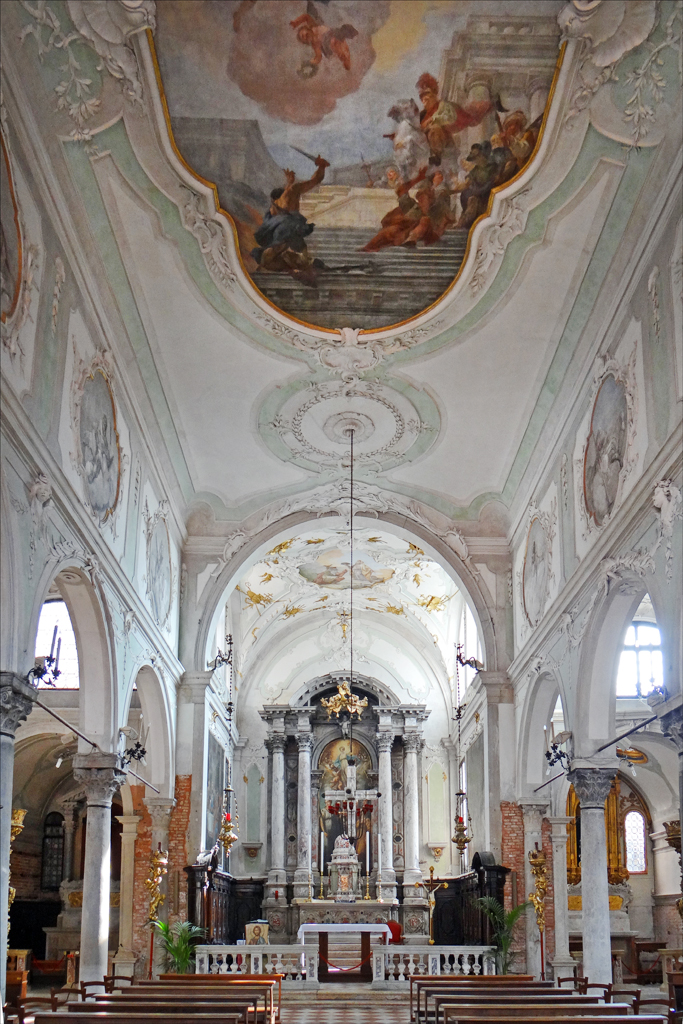 La nef centrale de l'Eglise Sant'Eufemia dans l'île de la Giudecca à Venise L'église Sant'Eufemia (Sainte Euphémie) a été fondée au IXè siècle sur l'île de la Giudecca à Venise Elle a été restaurée à plusieurs reprises, les travaux de décoration (stucs, peintures,..) réalisés au XVIIIè siècle y sont encore très visibles. L'église d'origine avait la forme traditionnelle d'une basiliques vénéto-byzantine, plusieurs colonnes et des chapiteaux datent de sa fondation. Elle comporte trois nefs qui sont orientées parallèlement au canal de la Giudecca. La façade possède un intéressant portique.